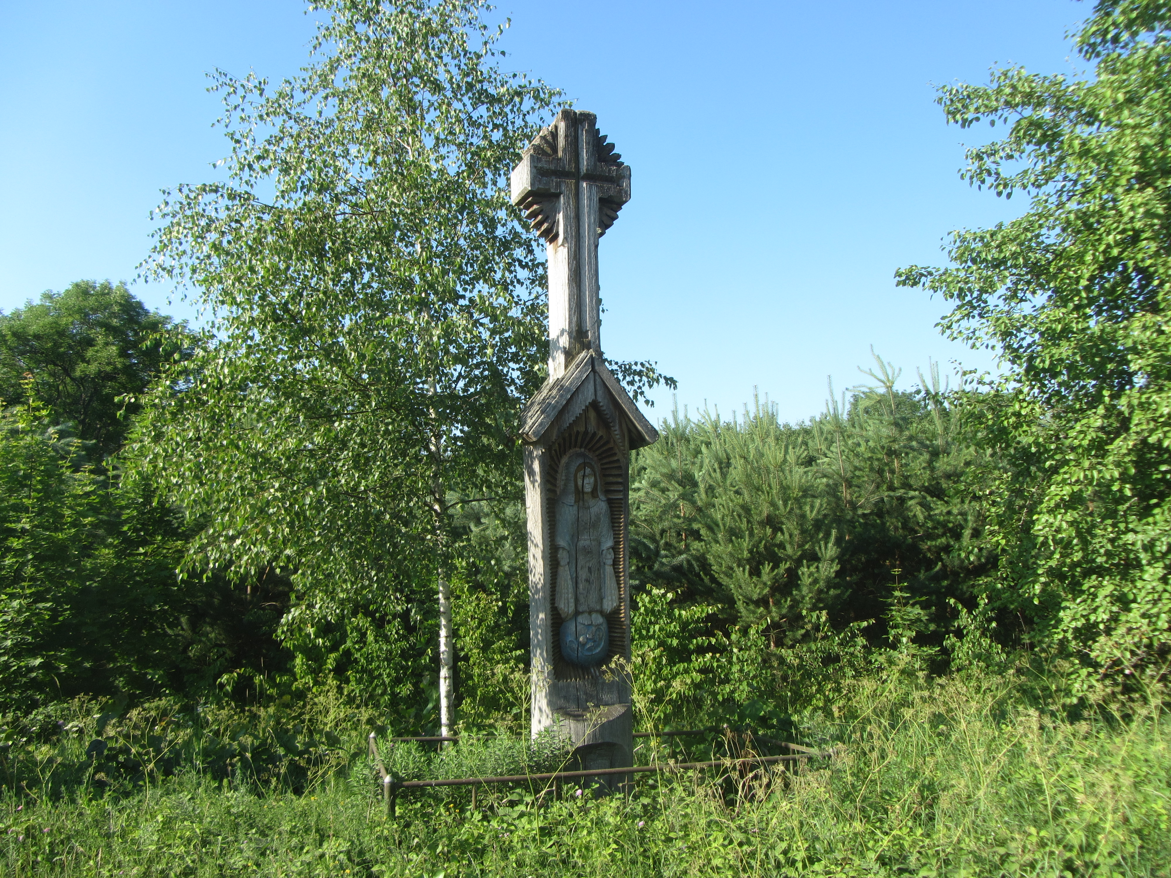 Raitininkų sen., Lithuania